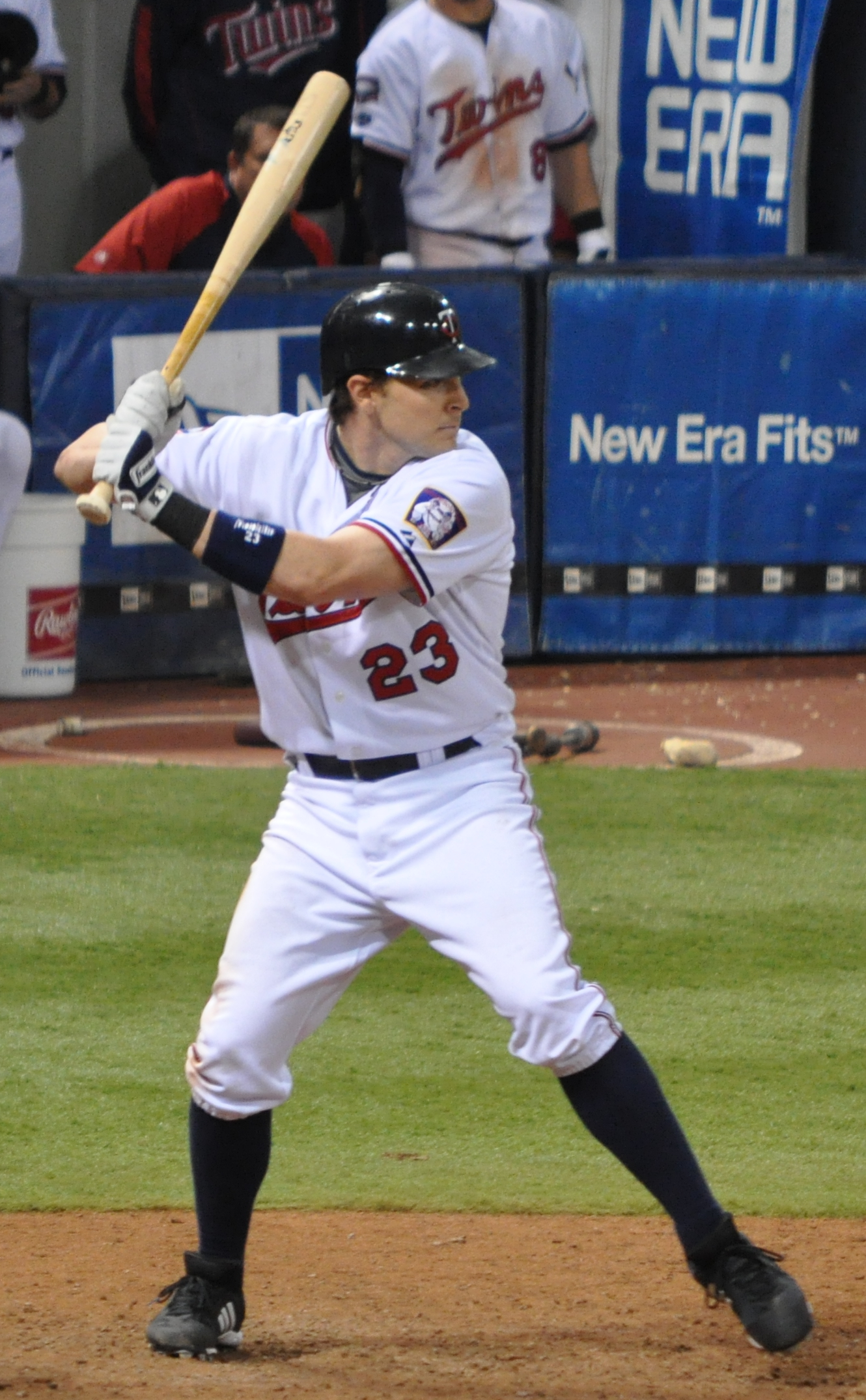 Brendan Harris